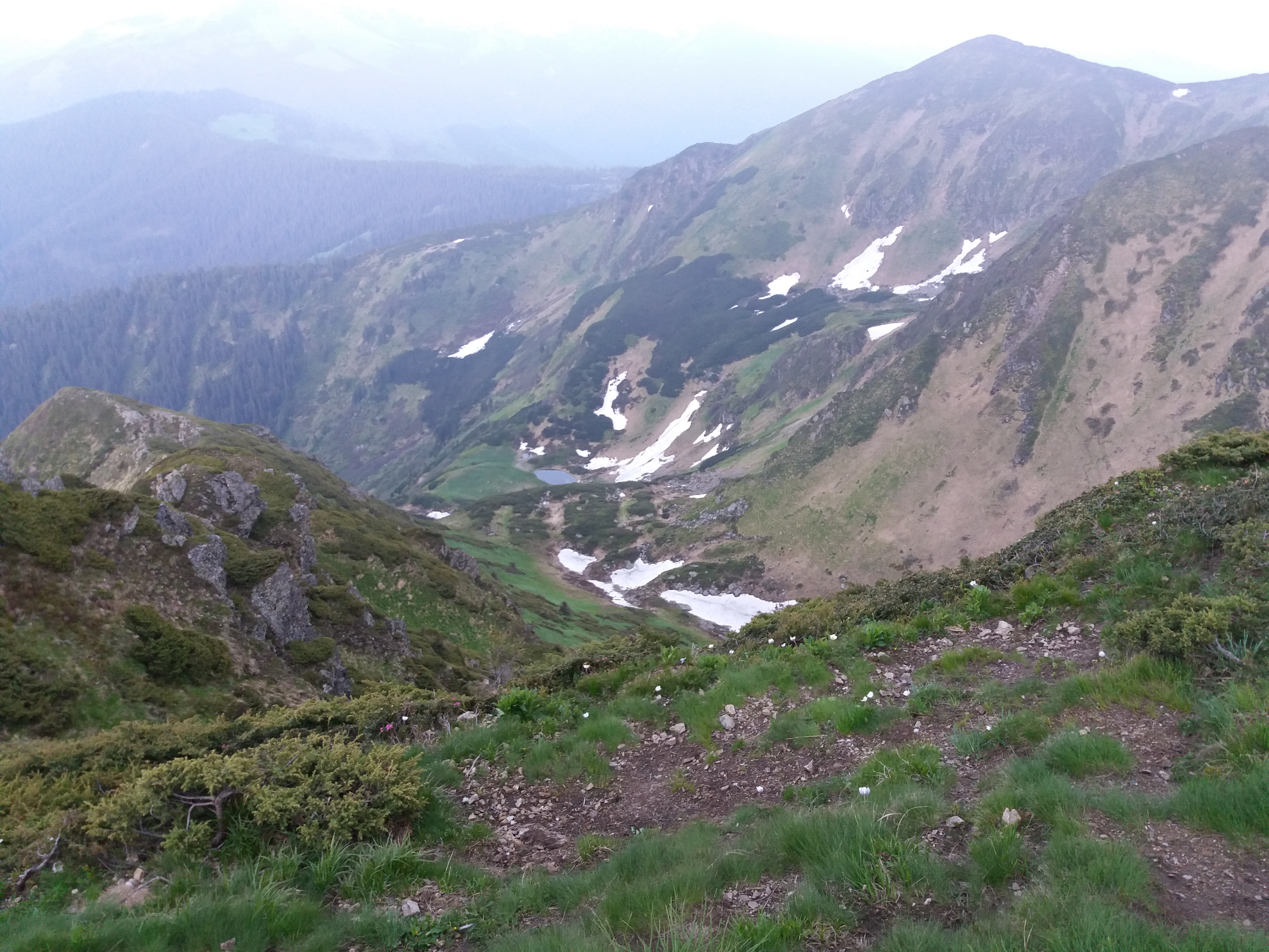 Мармароси. (Вікіекспедиція)